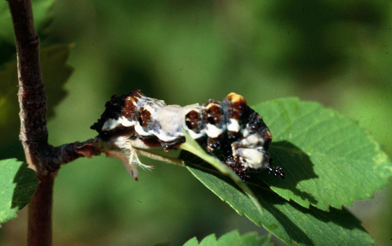 Limenitis archippus, larva.